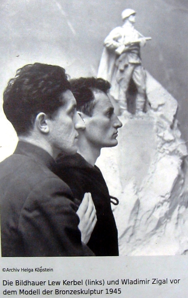 Abbildung von Lew Kerbel und Wladimir Zigal vor der Monumentalplastik der Gedenkstätte. Aufnahme von Helga Köpstein, aufgenommen auf einer öffentlich zugänglichen Informationstafel Nr. 10 der Gedenkstätte. Die Gedenkstätte Seelower Höhen erinnert in der brandenburgischen Kreisstadt Seelow (Landkreis Märkisch-Oderland) an die Schlacht um die Seelower Höhen im Jahr 1945.